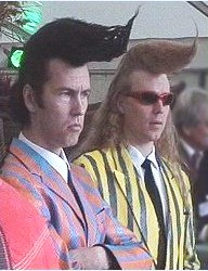 The Leningrad Cowboys (leider nur zwei von ihnen) Dieses Bild hatte ich für eine andere Präsentation verkleinert, das Original ist leider nicht mehr auffindbar. Selbst aufgenommen auf dem Richtfest für den finnischen EXPO-Pavillon im Oktober 1999 --Plenz 10:17, 6 January 2007 (UTC)